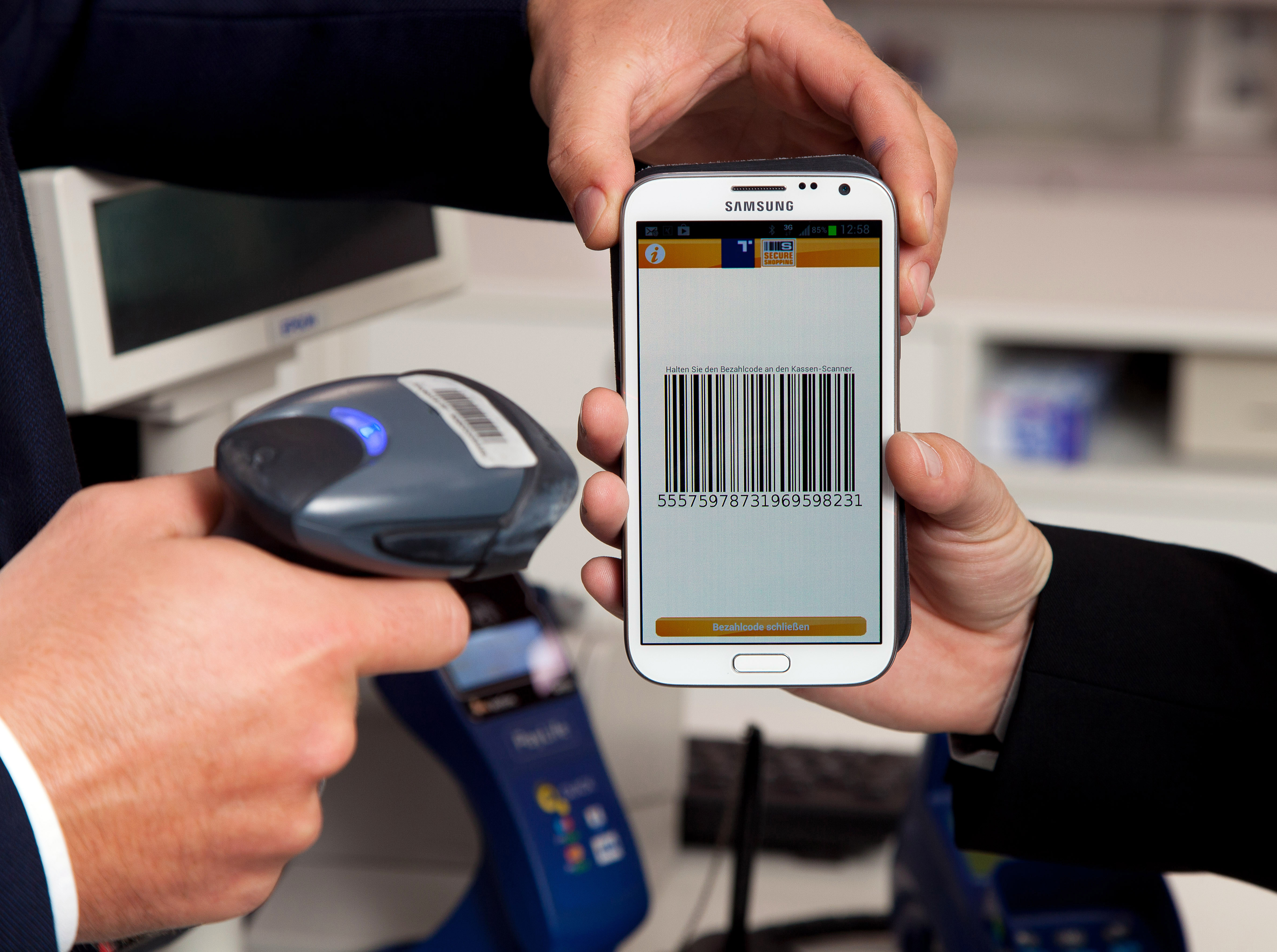 Ein Zahlungsvorgang mittels Smartphone und der VeroPay-App. Dabei wird ein am Display dargestellter EAN-Barcode mit dem Kassenscanner abgelesen und dadurch ein Lastschrifteinzug auf dem Girokonto ausgelöst.